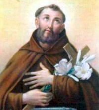 San Fidel de Sigmaringa